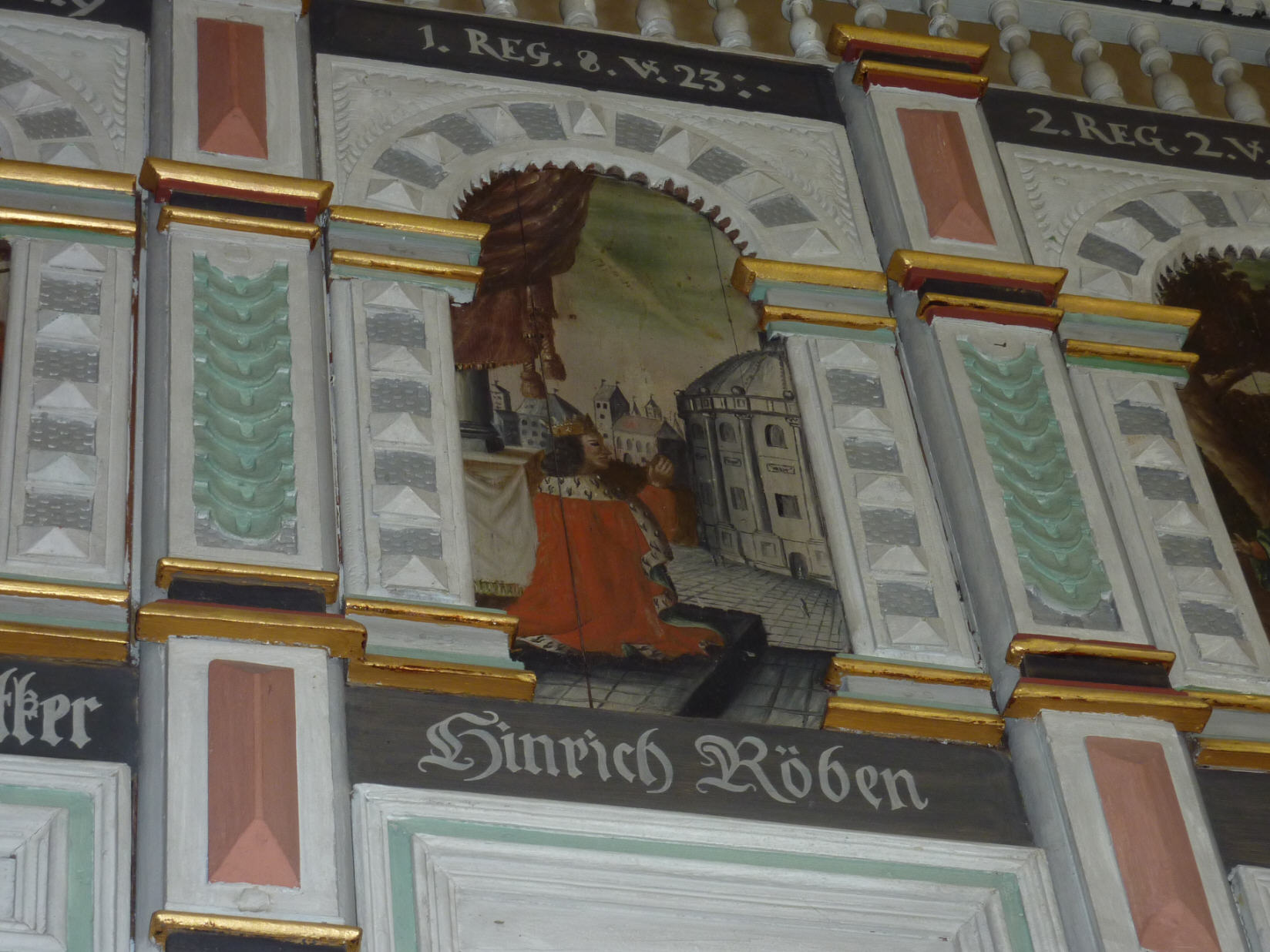 Emporenmalerei in St. Johannes, Bad Zwischenahn (1. Könige)